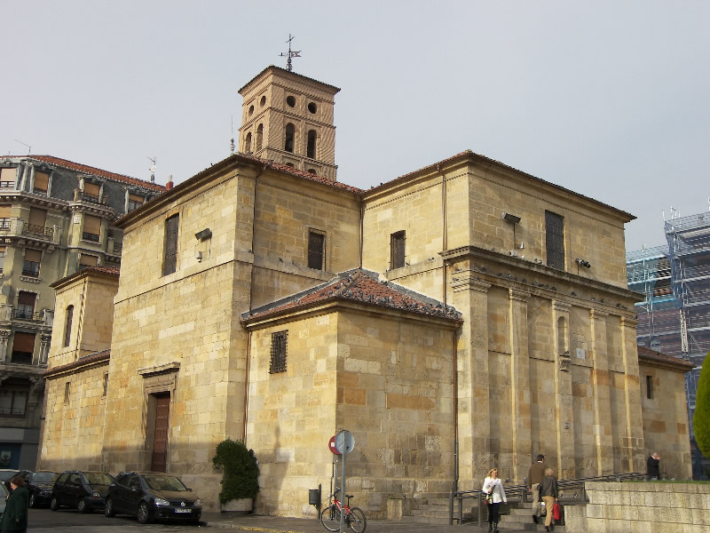 Iglesia de San Marcelo, León